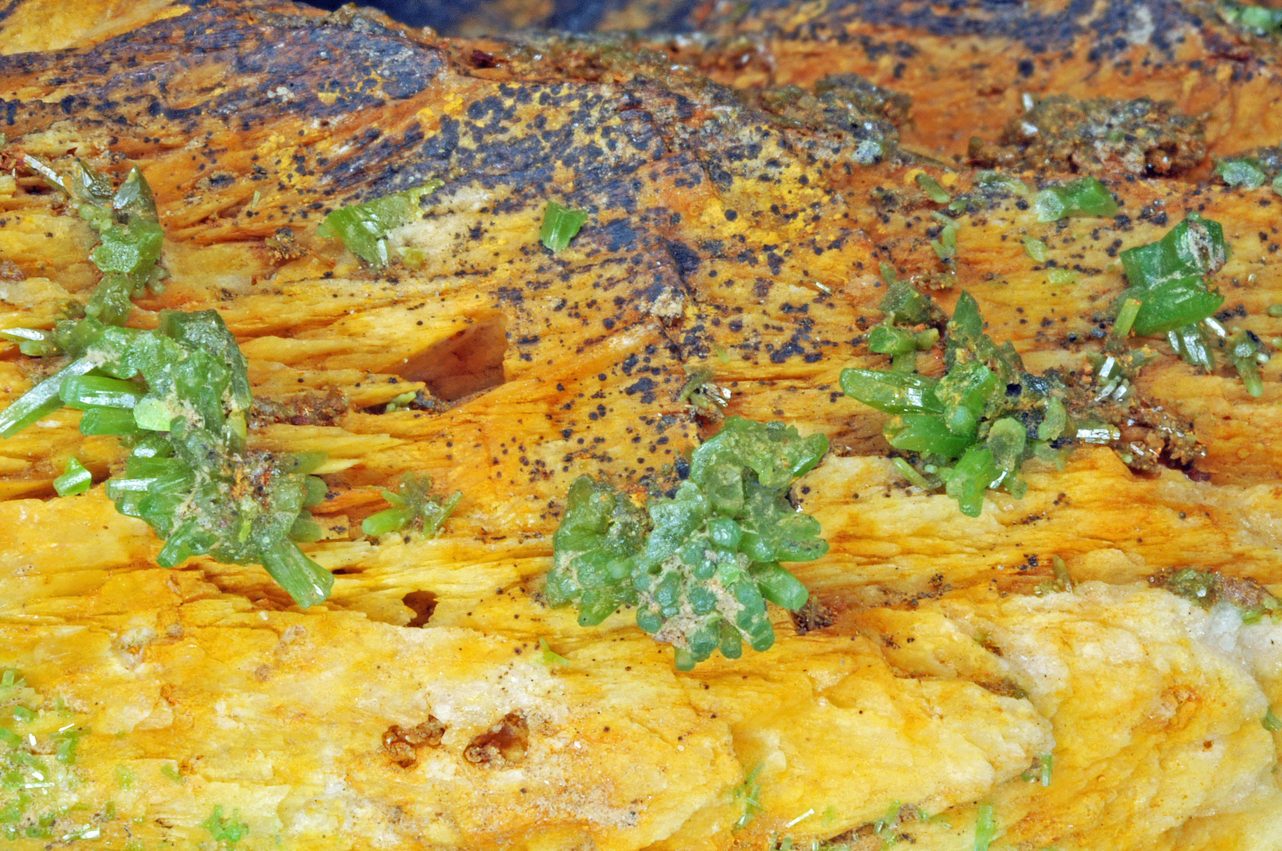 cristaux de pyromorphite